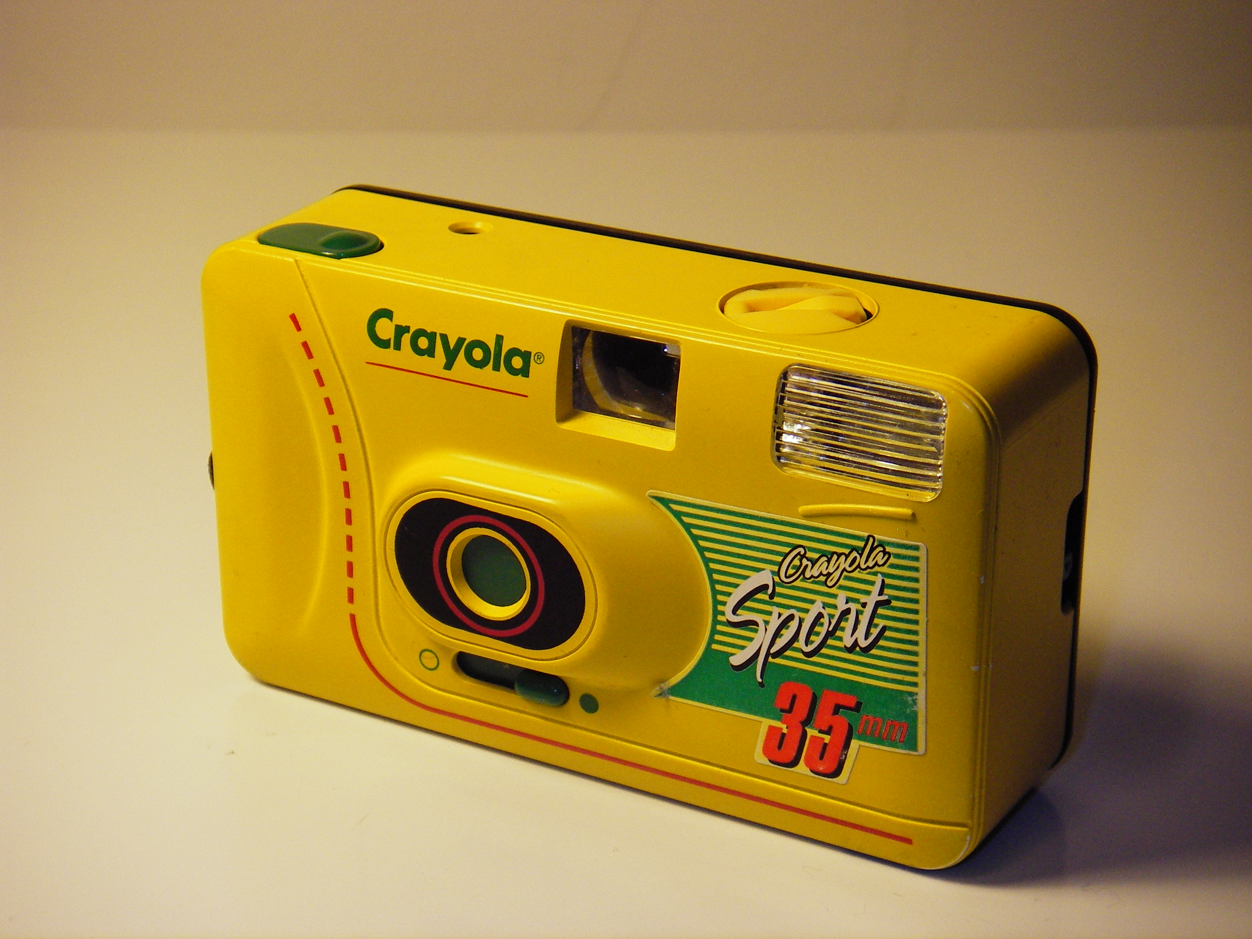 Recent promotional toy camera acquisition.